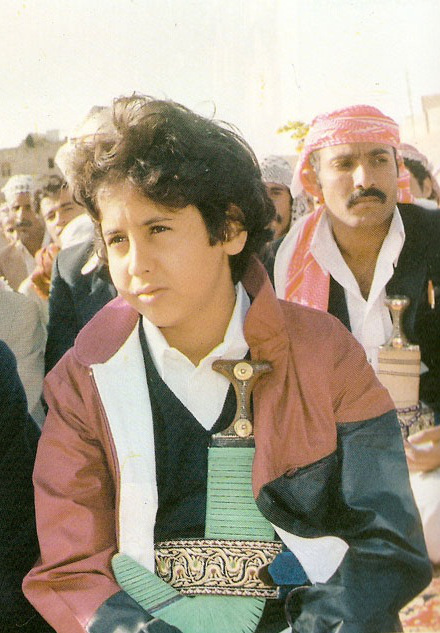 Ahmed Ali Abdallah Saleh